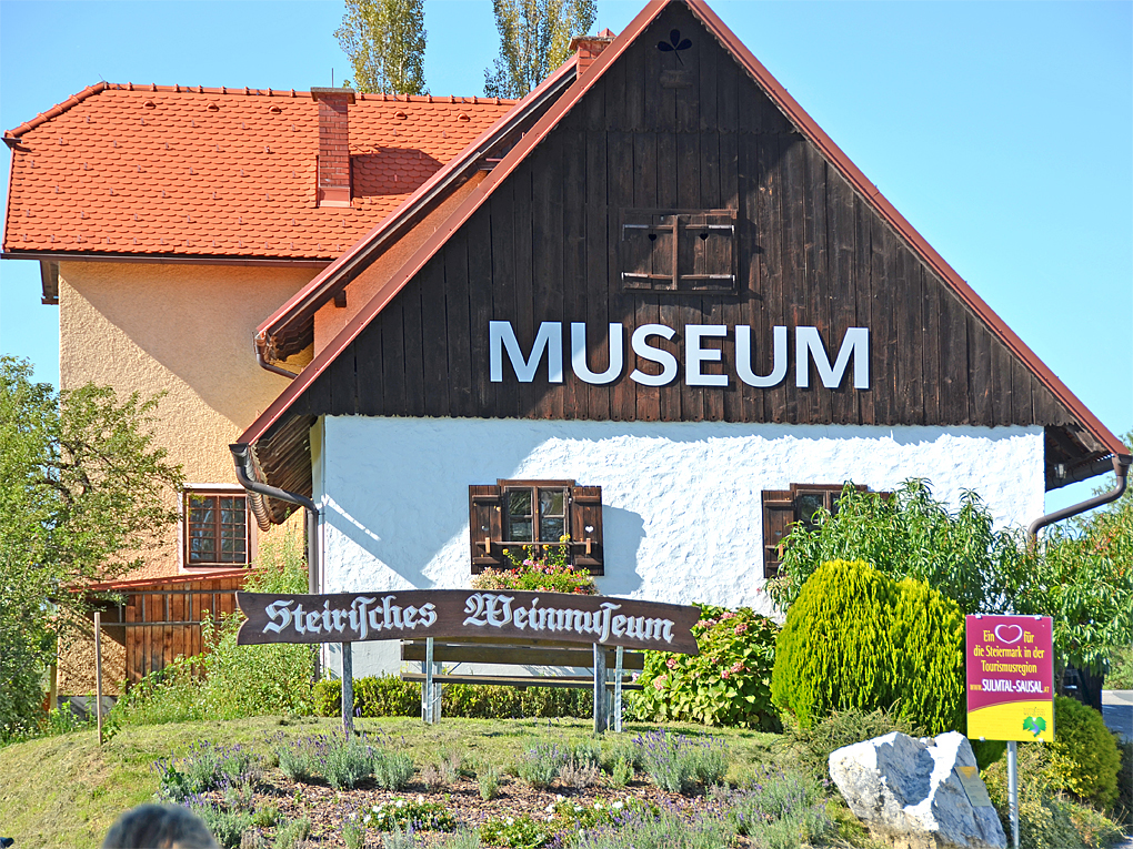 Kitzeck im Sausal Hauerhaus Steinriegel 15 ObjetID: 82137